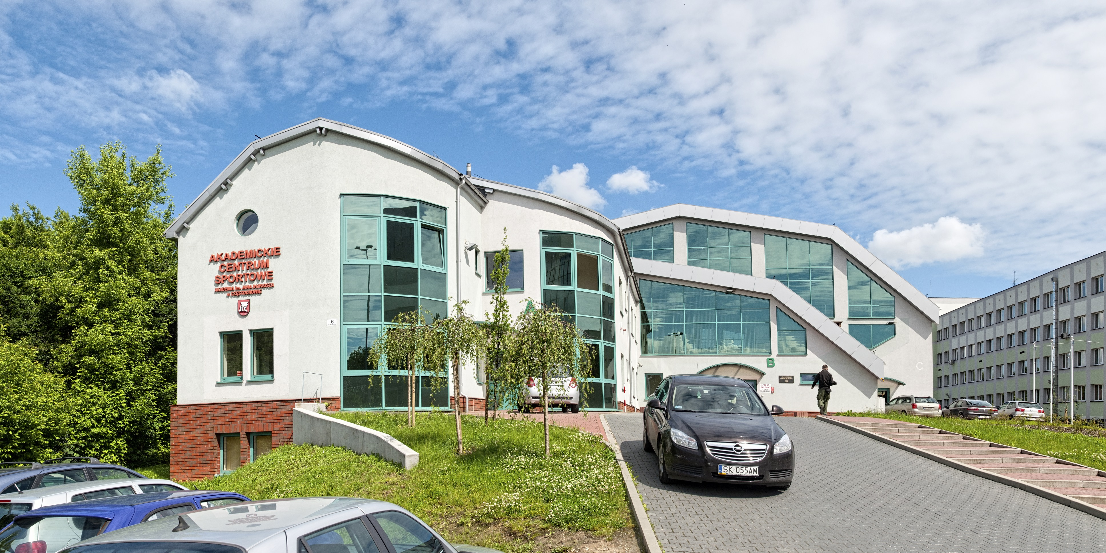 Budynek dydaktyczny